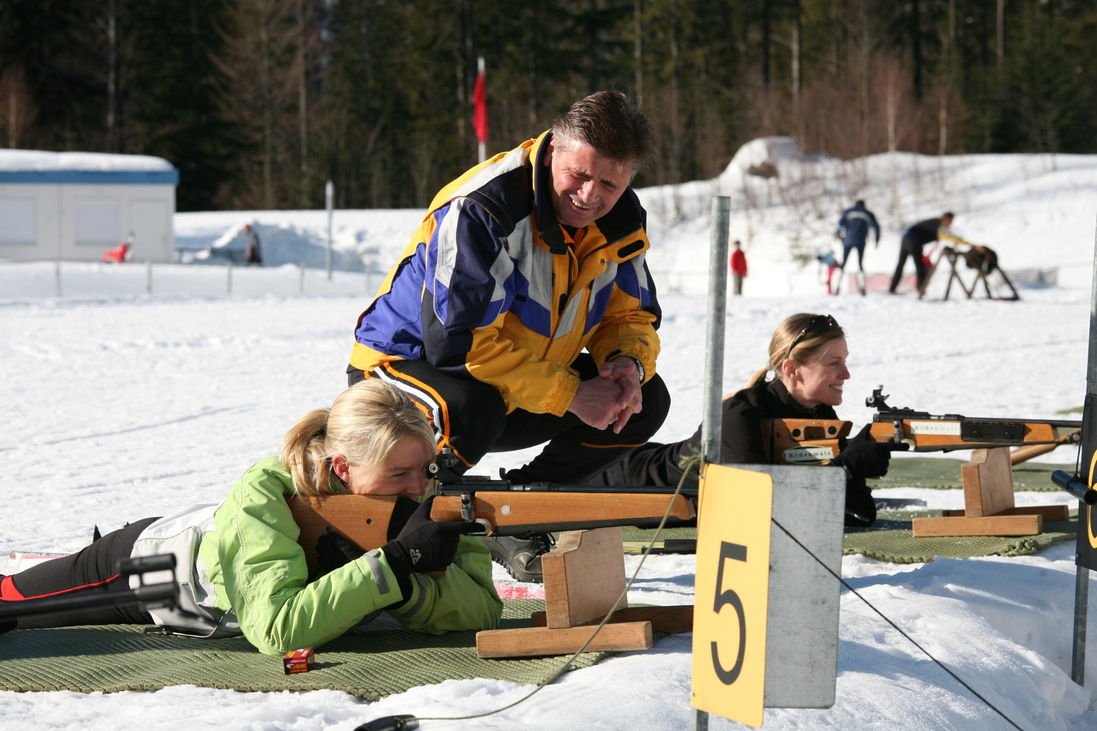 Josef Schneider auf einem Biathlon Event im Hohenzoller Skistadion im März 09